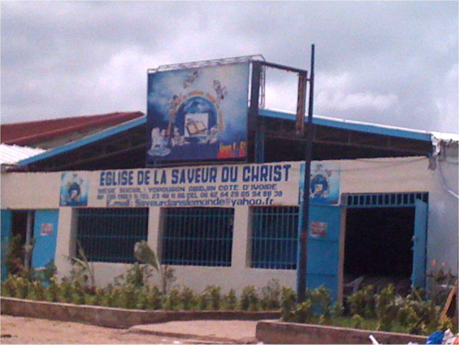 Église de la saveur du Christ. Lieu de culte évangélique à Yopougon, Côte d'Ivoire